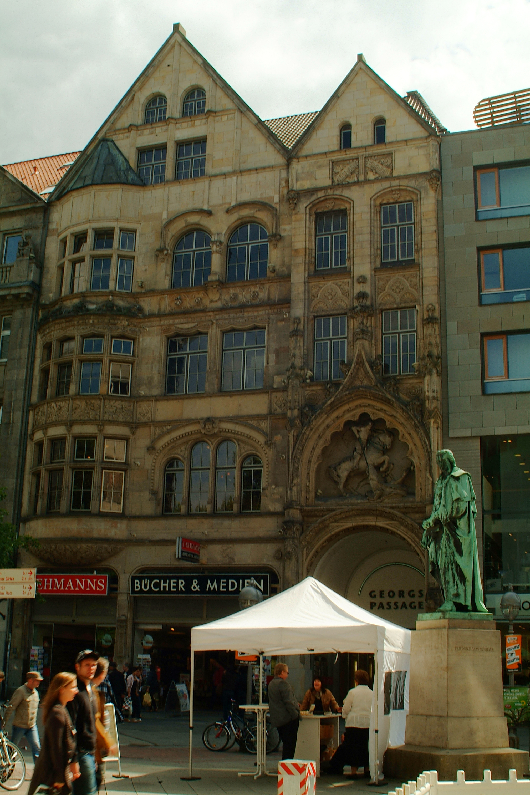 In der zentralen Fußgängerzone von Hannover, am Schnittpunkt von Georgstraße und Schillerstraße, finden zu Füßen des Schillerdenkmals vor dem Fuge'schem Haus mit der Georgspassage häufig auch kleinere Kundgebungen statt.